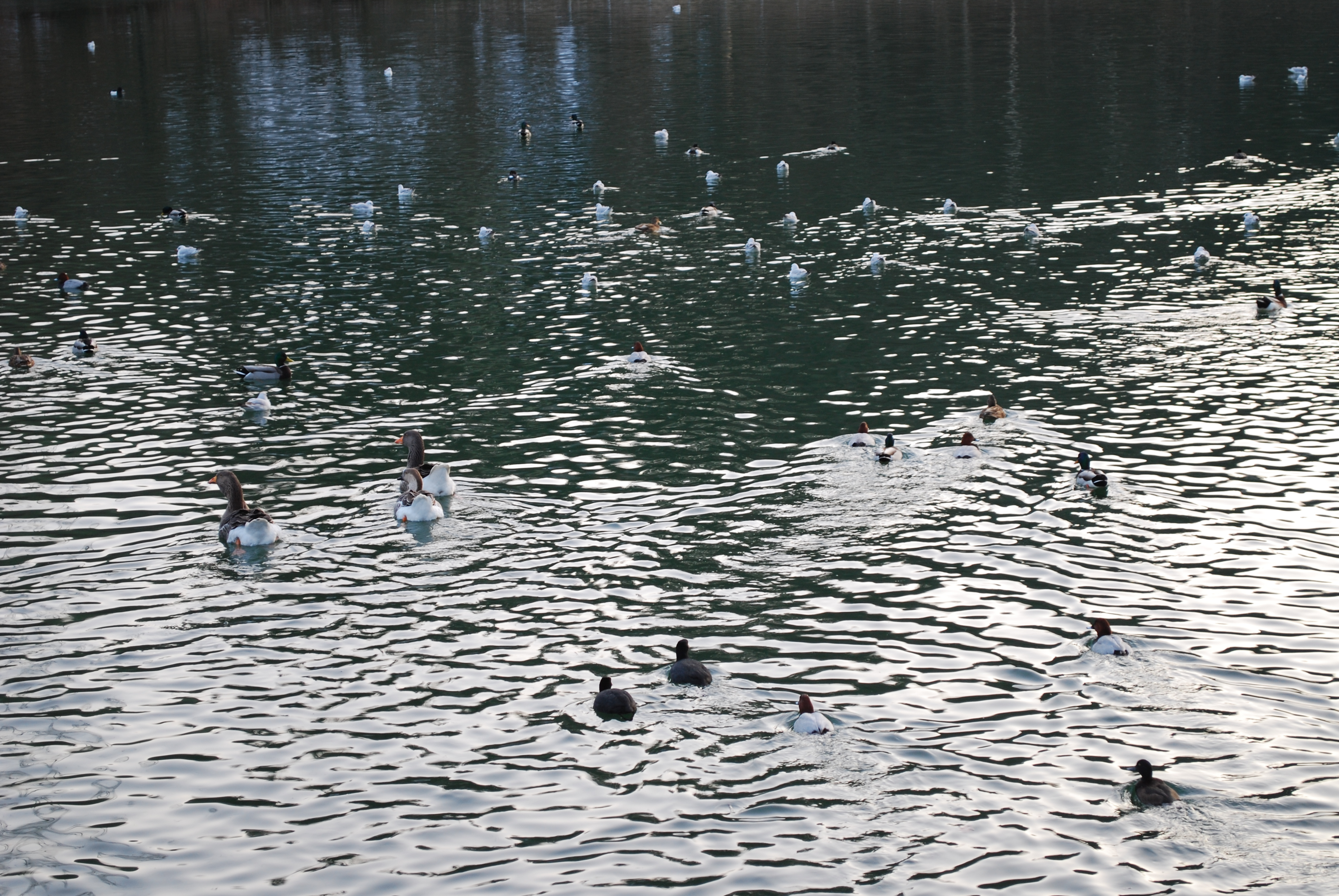 Entenarten auf dem Gübsensee im Winter: Lachmöwen hinten, vorn rechts Reiherenten-Weibchen, weiter links und darüber entfernen sich zwei Tafelenten-Männchen und (schwarz) zwei Blässhühner, zwischen den Graugänsen (links) tummelt sich eine Schwanengans. (Identifikation von Geaster)